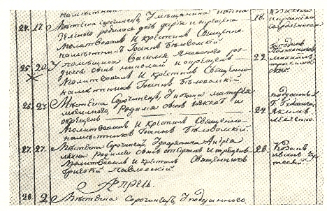 Запись о рождении Гоголя (помечена крестом) в метрической книге Спасо-Преображенской церкви в Больших Сорочинцах.